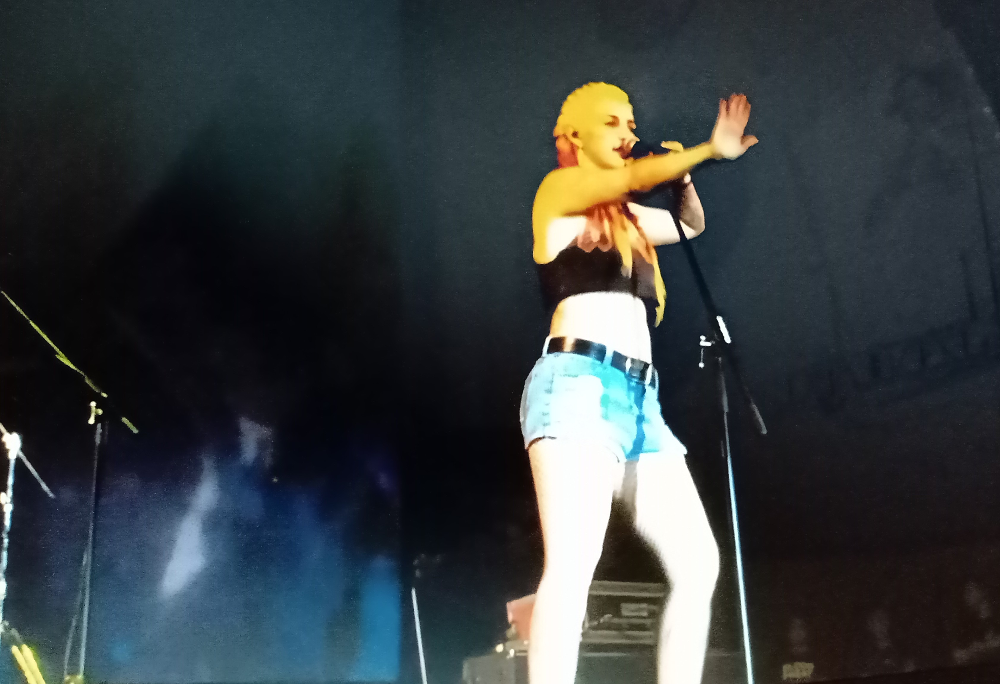 JotDog en concierto en el Tecate Arcadia, 2017.